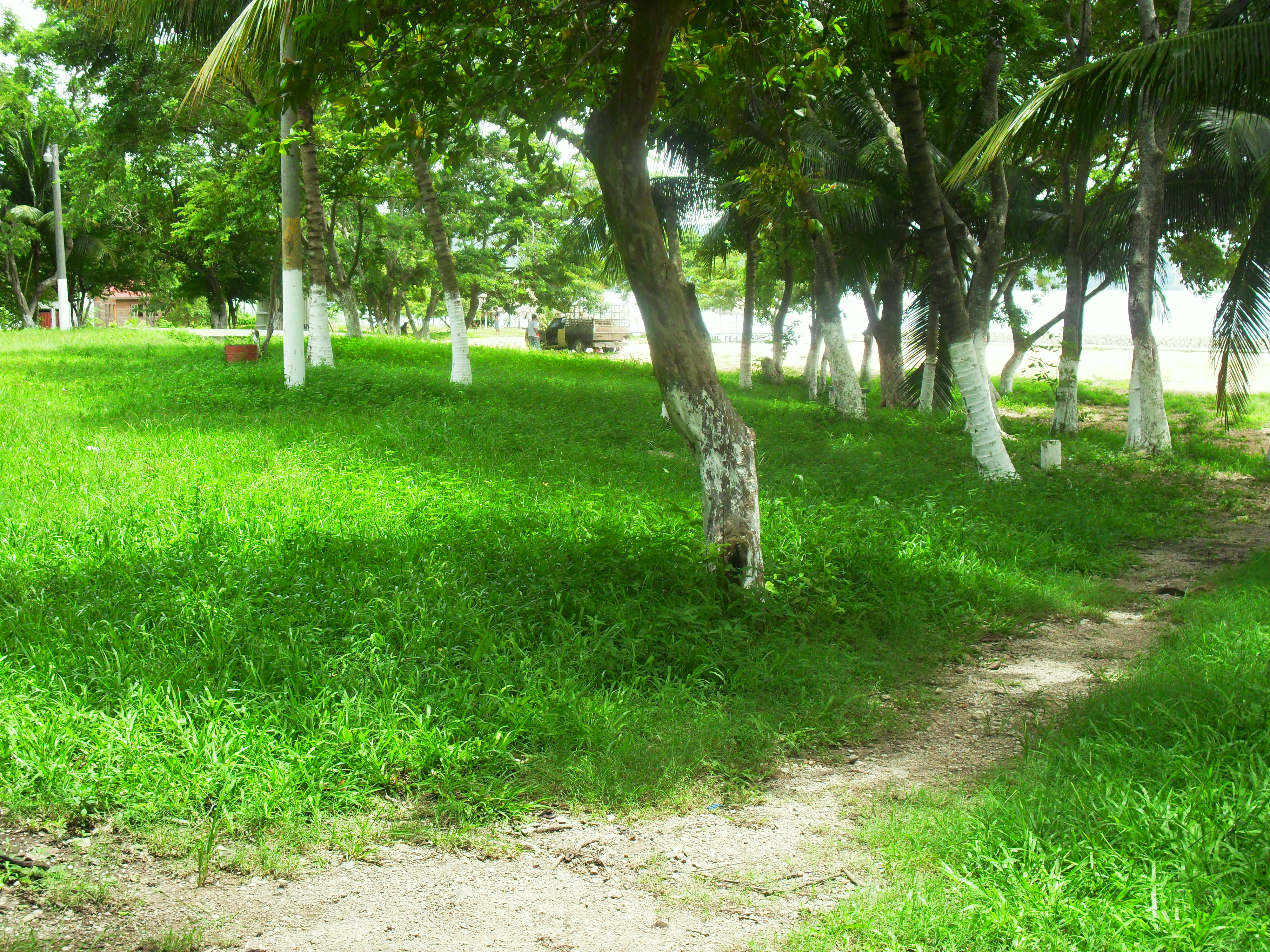 La entrada del Balneario El pedregal cuenta con su generosa fauna. San Benito, El Petén, Guatemala.